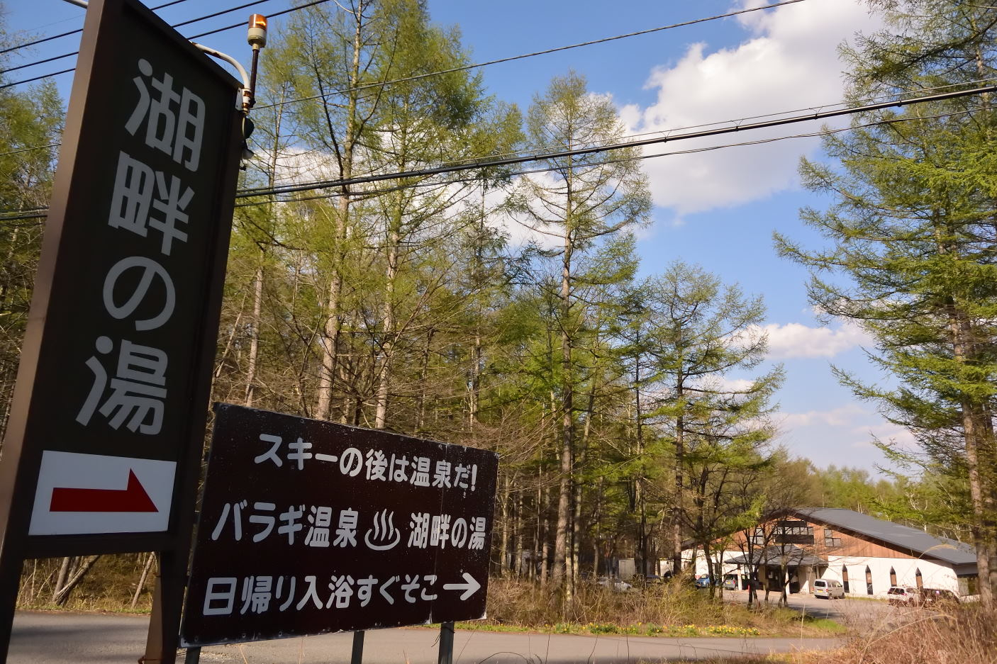 バラギ湖畔にある日帰り入浴施設。